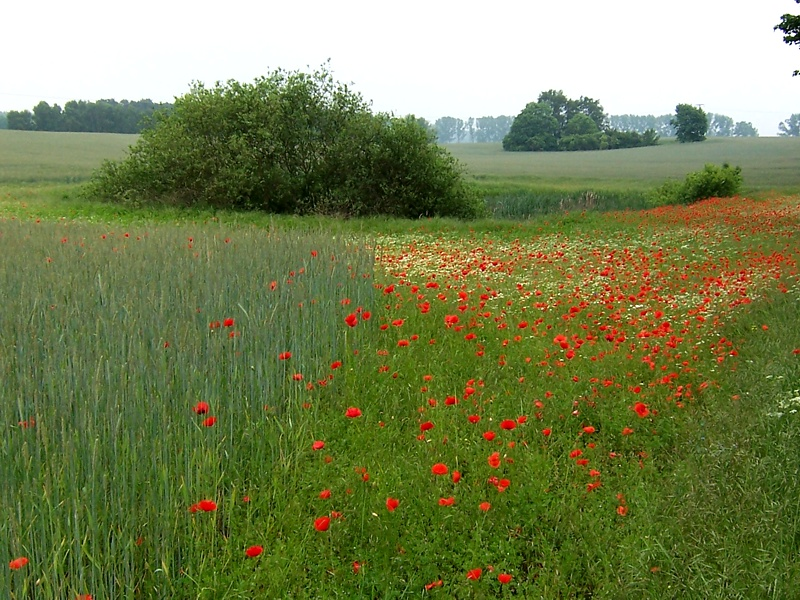 Landschaft nördlich von Crivitz